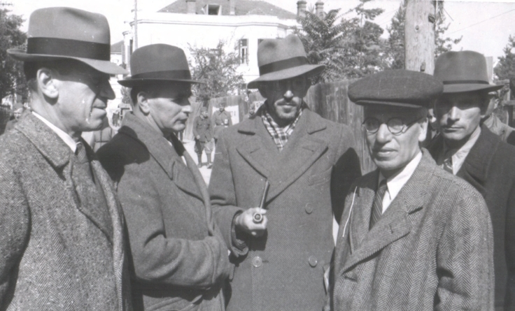 Методија Андонов-Ченто (втор одлево), Виктор Мануел Виласењор, претставник на Организацијата на Обединетите Нации (во средината), Димитар Влахов (втор оддесно) и други, во Битола